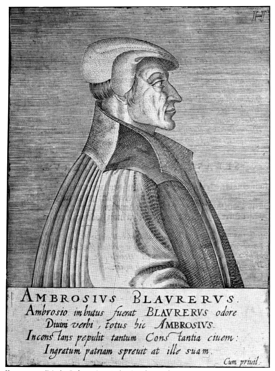 Ambrosius Blarer (1492-1564), deutscher Reformator